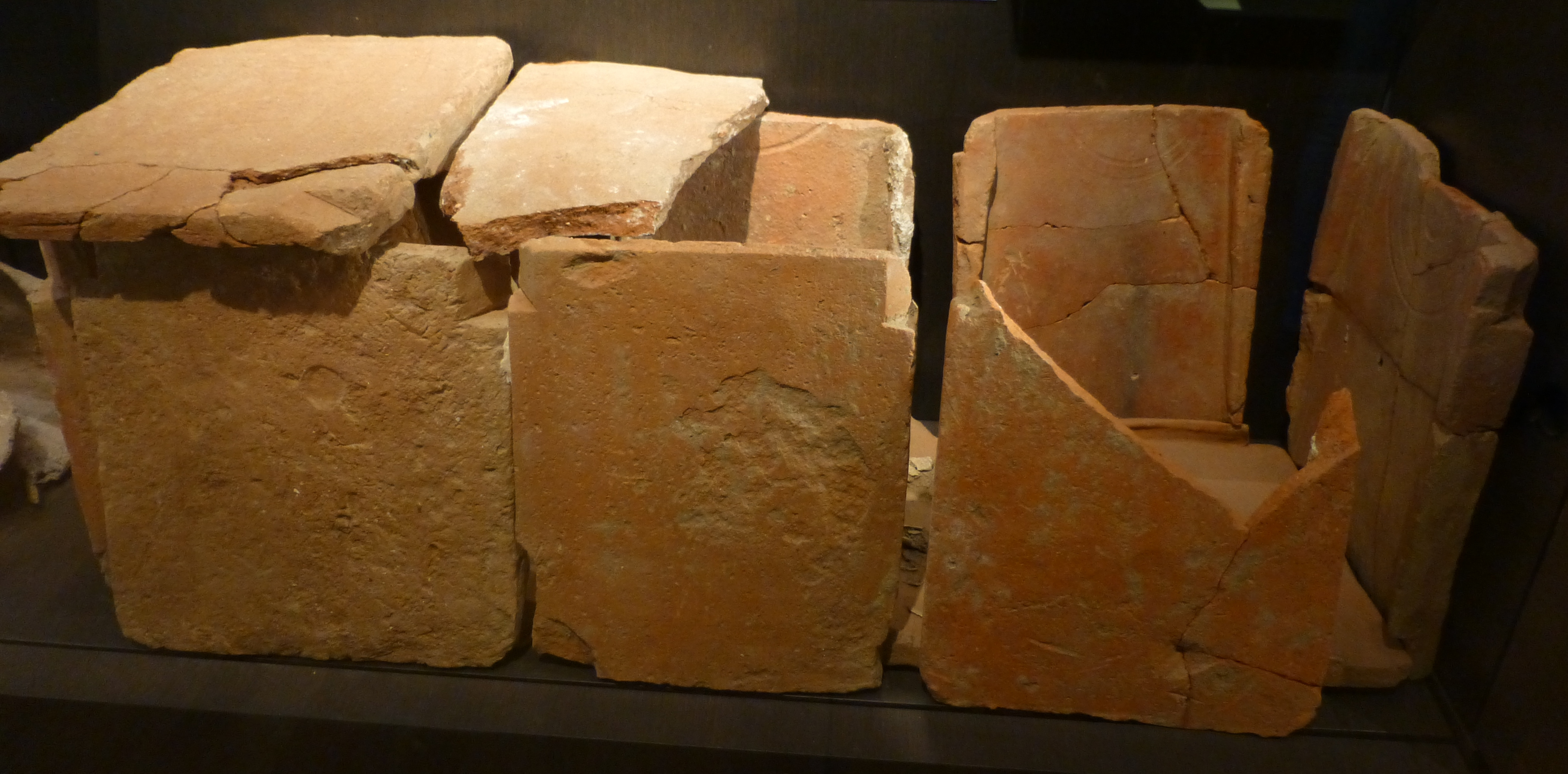 Angers (Maine-et-Loire, France), musée des beaux-arts, coffre en tuiles : sépulture d'enfant.